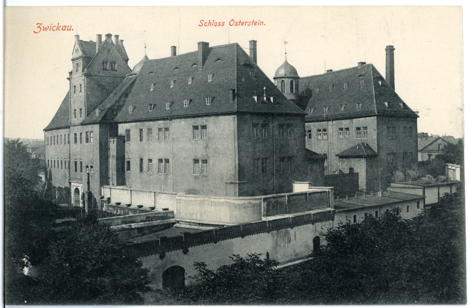 Zwickau; Schloß Osterstein This postcard is from publisher Brück & Sohn in Meißen ( postcard has a unique number 19904 and is available in a higher resolution at the publisher. This images was uploaded in a cooperation project between Wikipedians and the publisher.